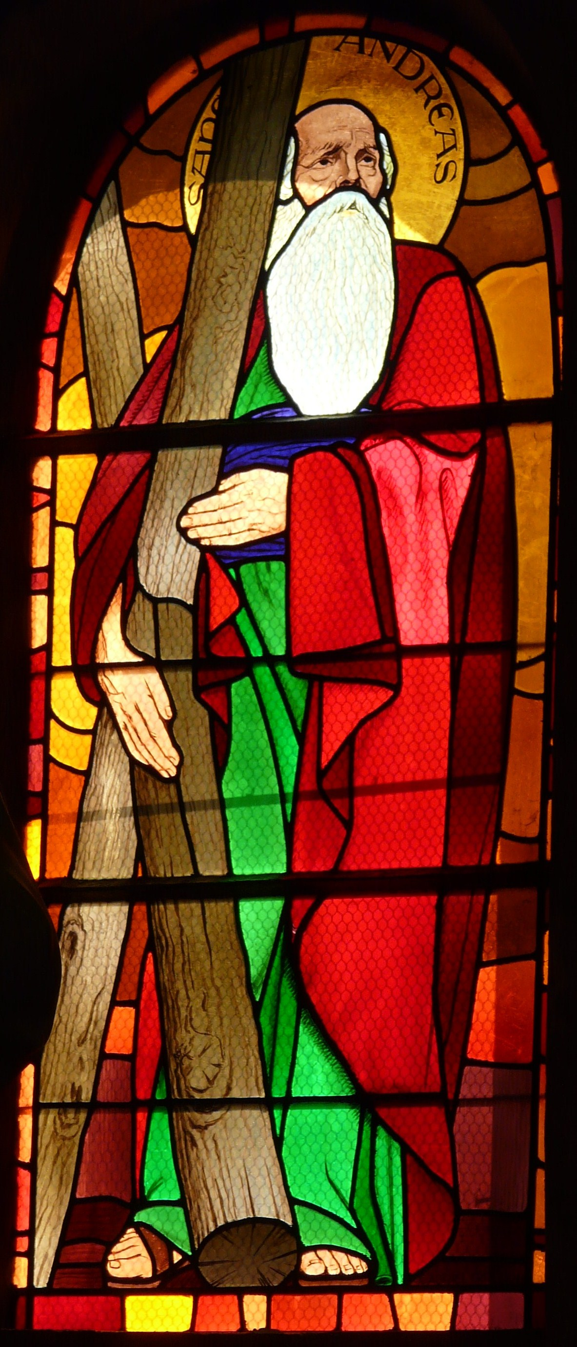 Vitrail de Gabriel Girodon dans l'église Notre-Dame-de-la-Paix de Ribérac, Dordogne, France.